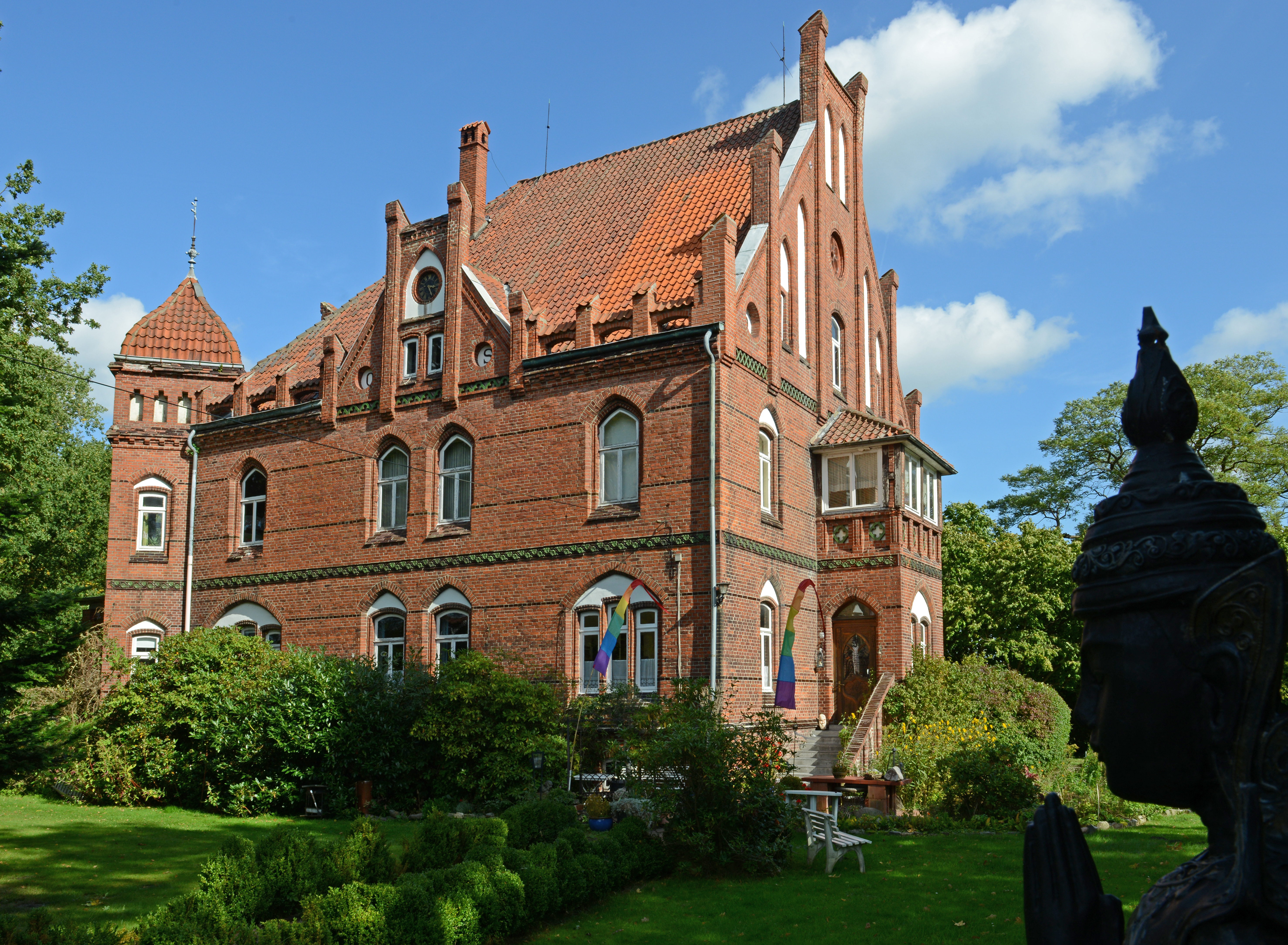 Baudenkmal in Twistringen Altenmarhorst